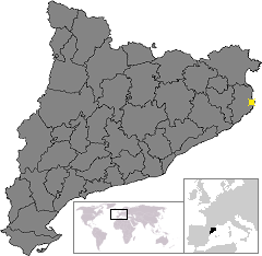 Localització de Begur. Location of Begur in Catalonia.